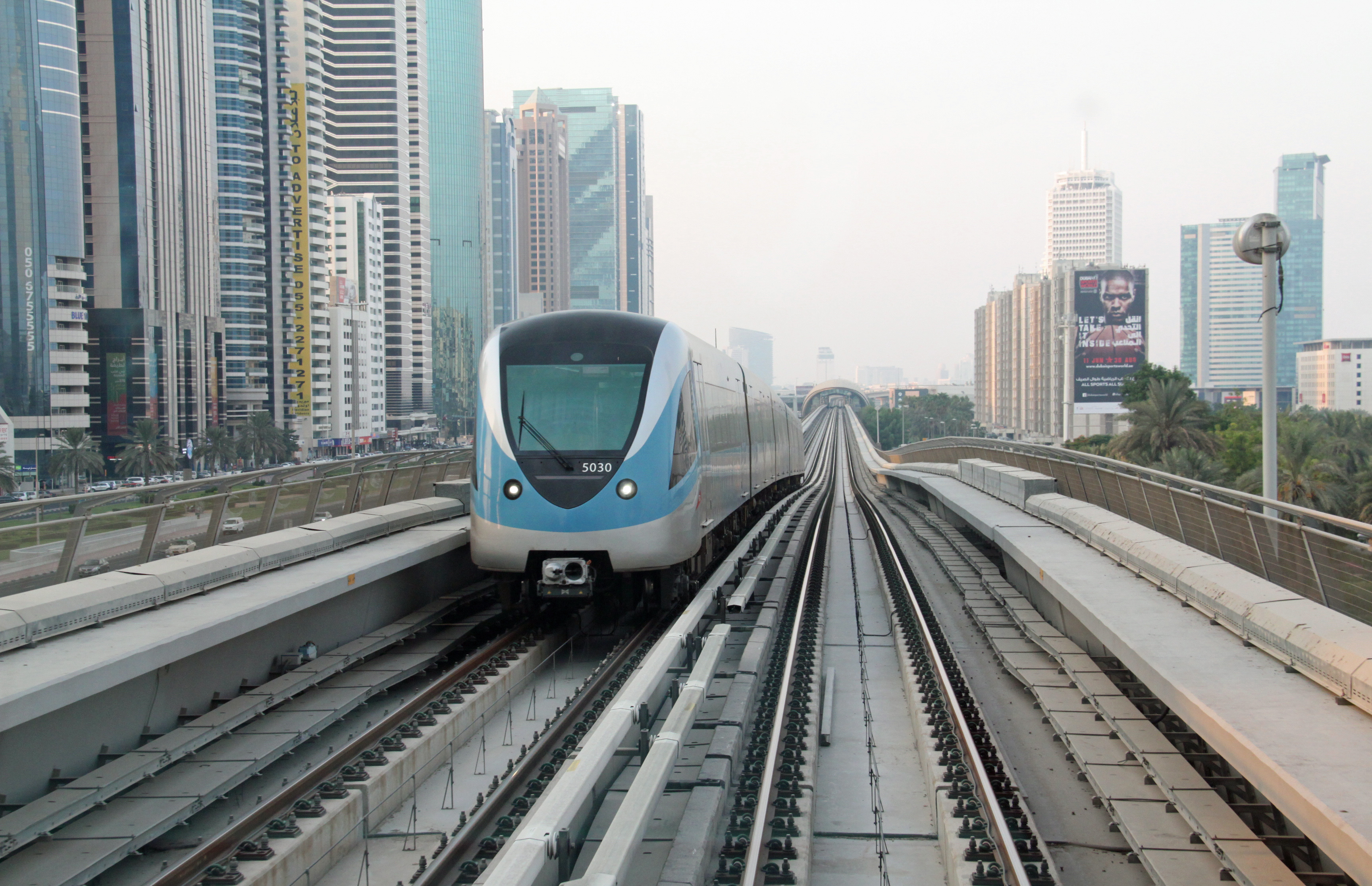 Een treinstel van de metro van Dubai